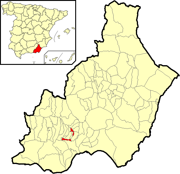 Situación del término municipal de Terque respecto a la provincia de Almería, en España.